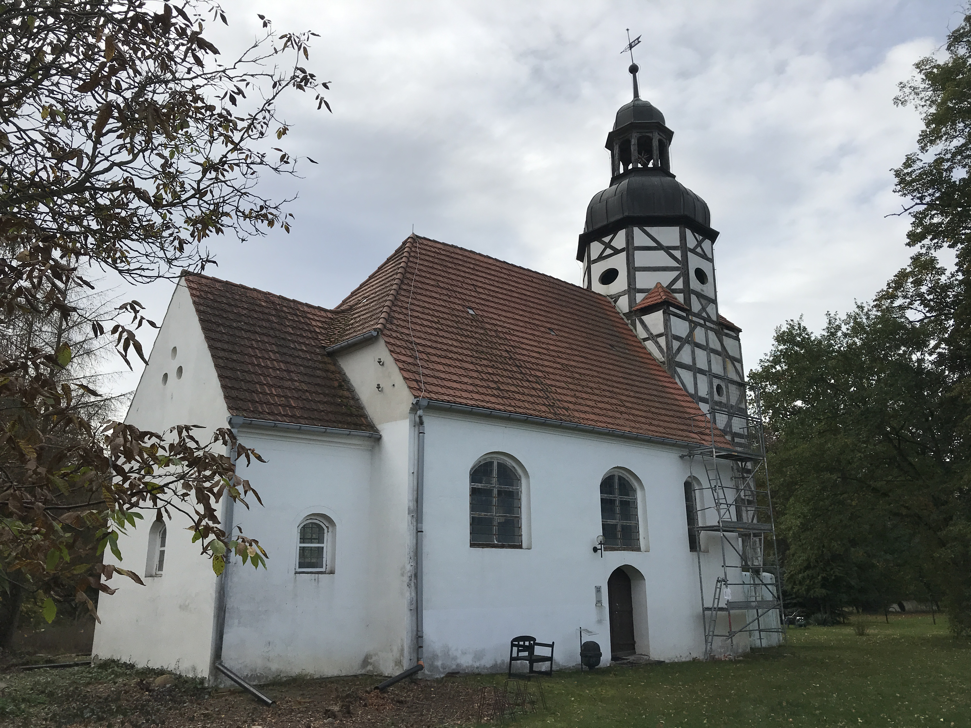 Die Dorfkirche Mehlsdorf in der Gemeinde Ihlow im Landkreis Teltow-Fläming ist ein Putzbau aus dem 16. Jahrhundert. Im Innern steht unter anderem ein Kanzelaltar aus der zweiten Hälfte des 17. Jahrhunderts.